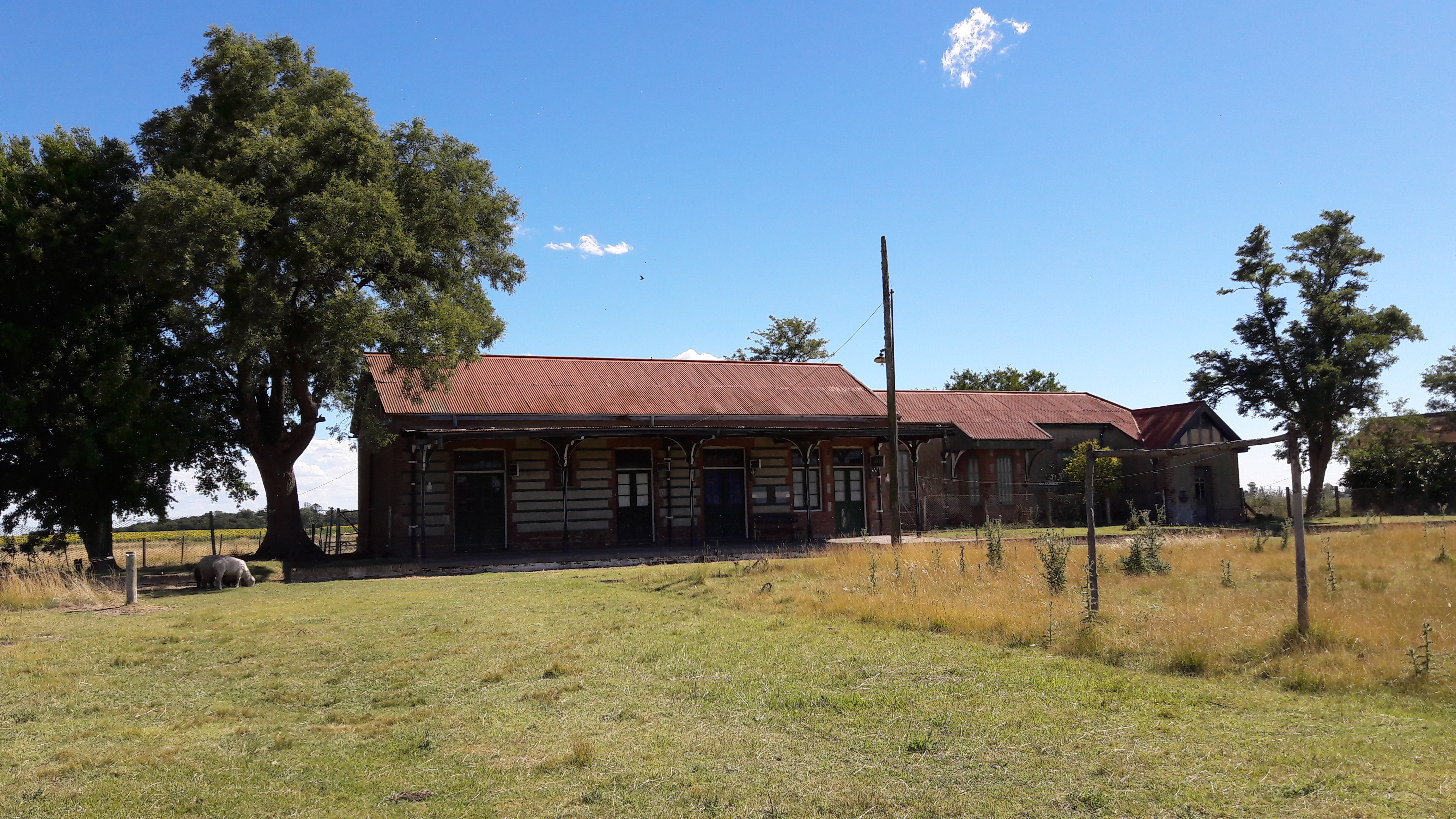 Foto Panorámica de la Estación